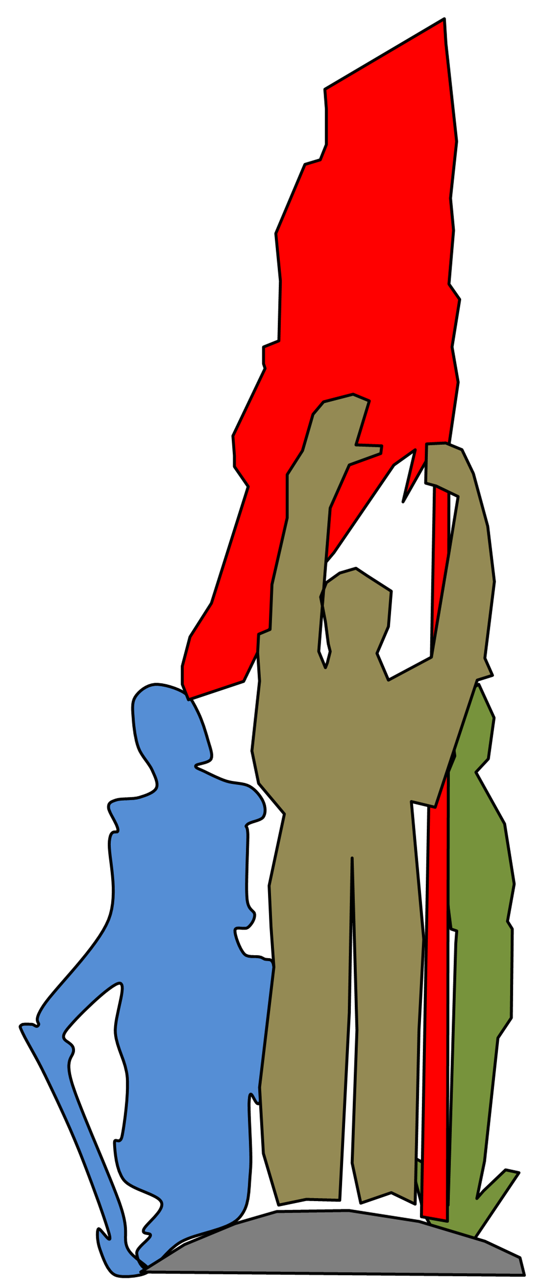 中文（香港）: 哈爾濱市人民防洪勝利紀念塔：塔頂人物塑像剪影